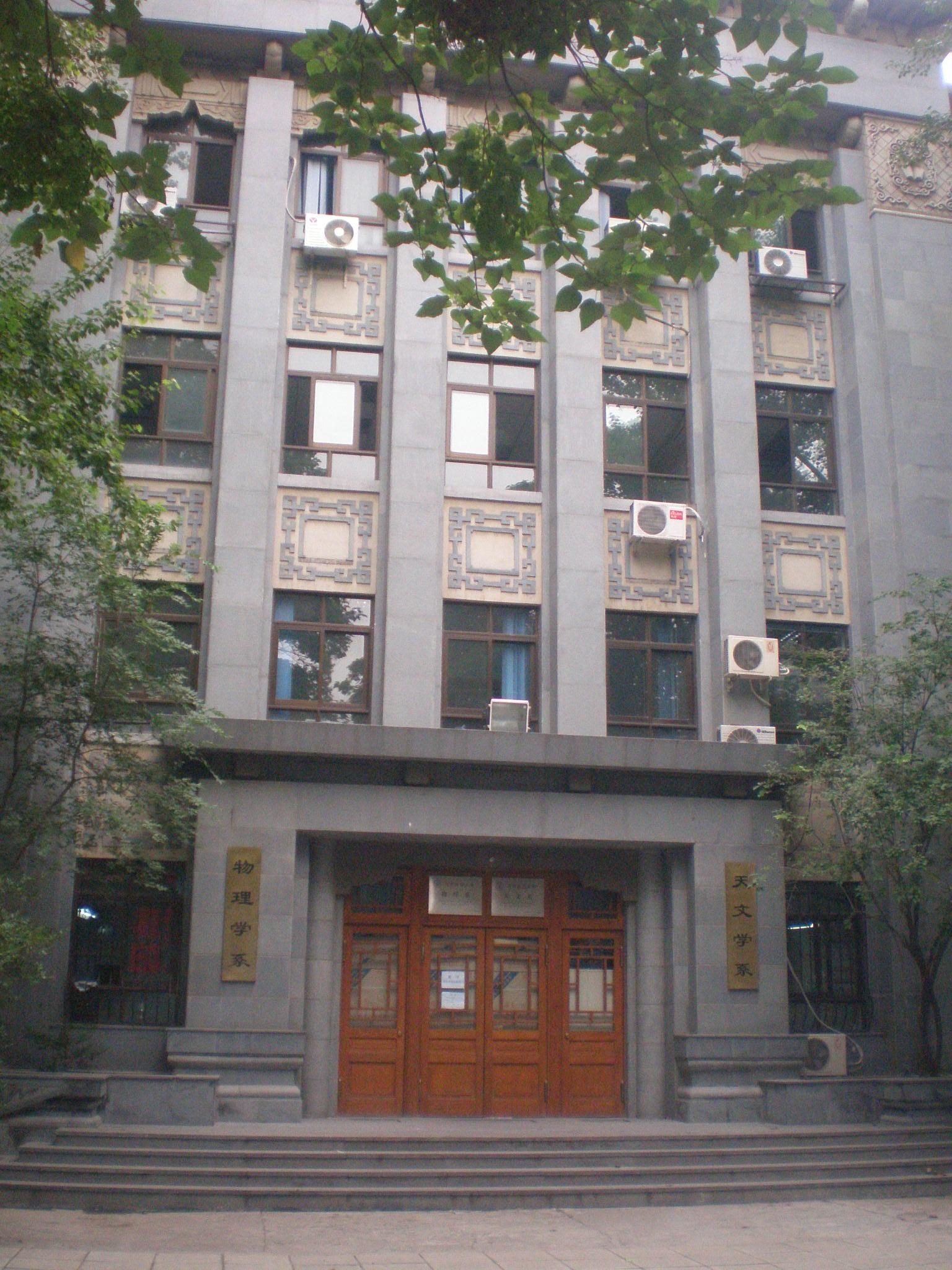 中文（中国大陆）: 北京师范大学